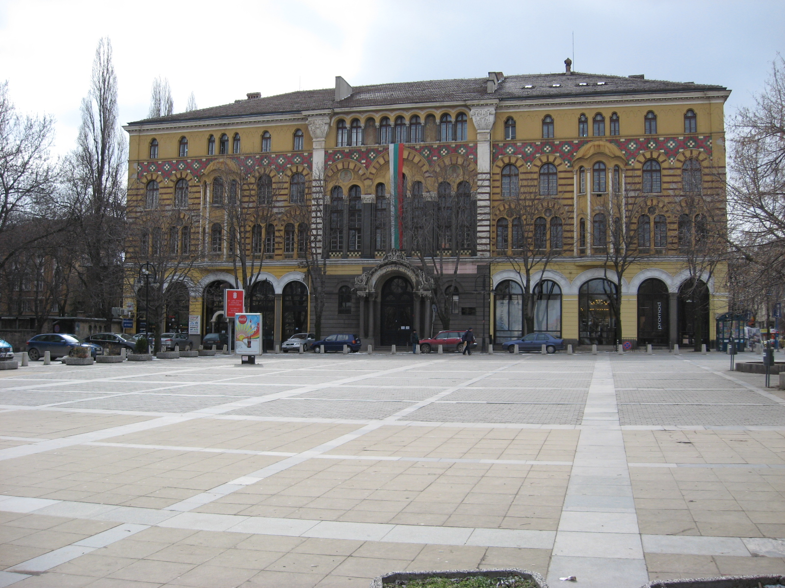 Slika Bogoslovskog fakulteta u Sofiji Sopstvena slika Dragan Cvetkovic Nis predaje se u javno vlasnistvo Licensing